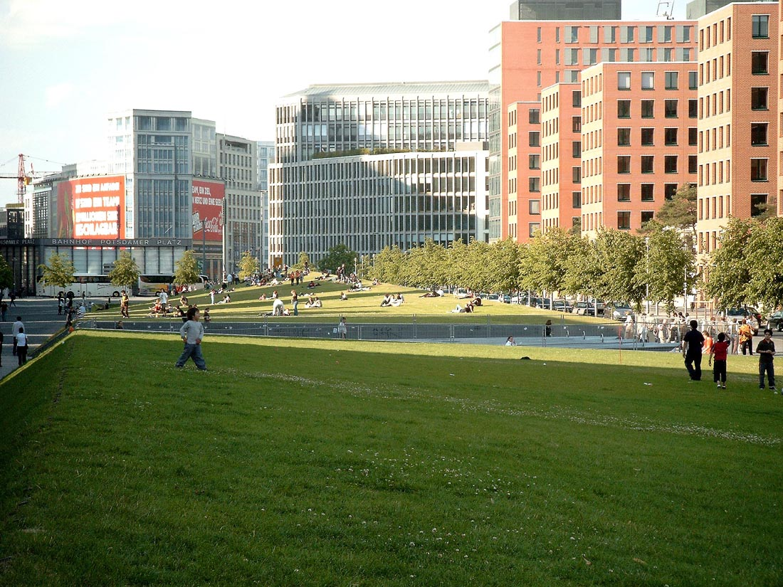 Tilla-Durieux-Park am Potsdamer Platz in Berlin entworfen von DS Landschapsarchitecten